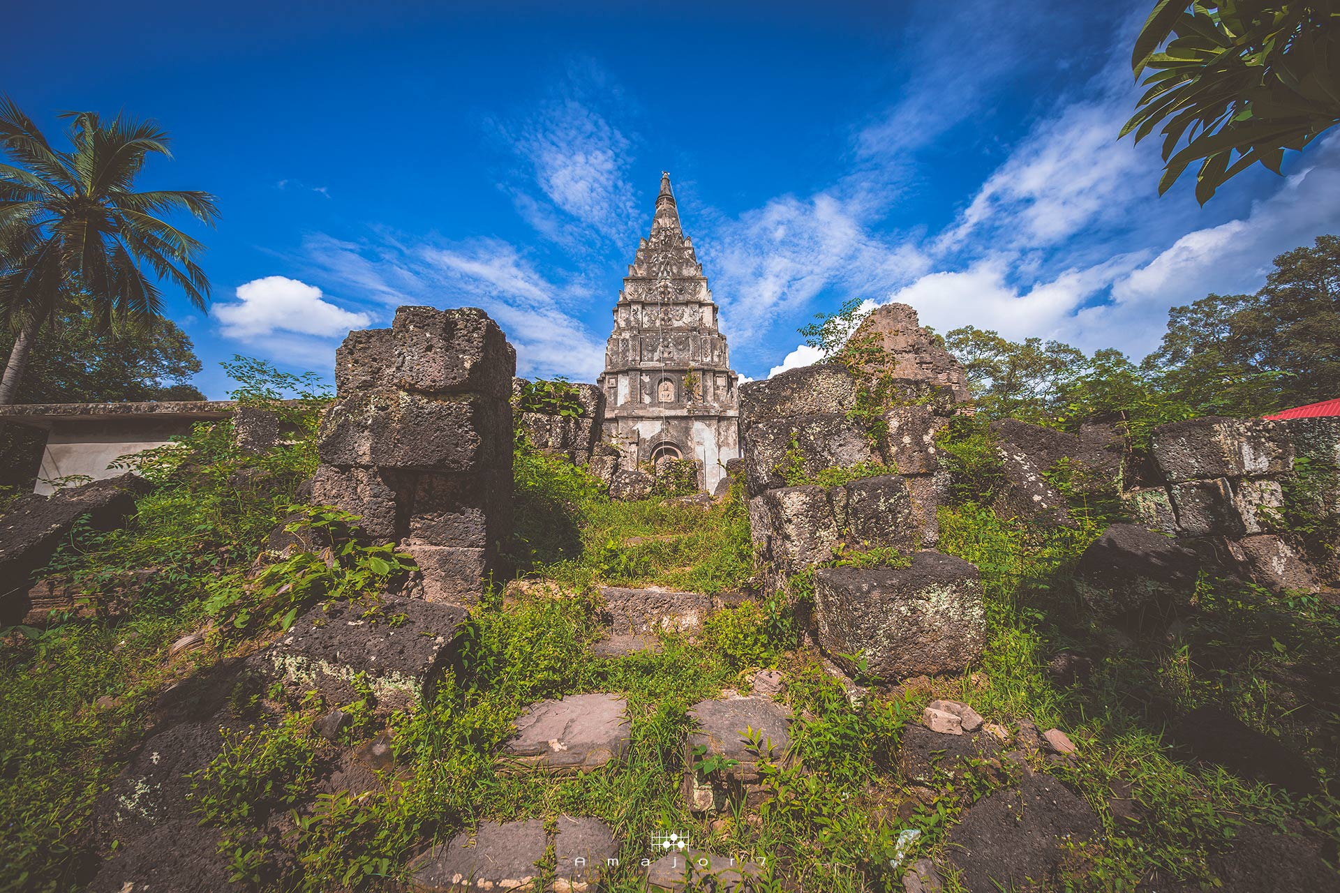 โบราณสถานกู่พระโกนาเป็นอีกหนึ่งเทวสถานศิลปะขอมสมัย บาปวน ซึ่งมีอายุราวพุทธศตวรรษที่ ๑๖ เป็นสถาปัตยกรรมร่วมสมัยเดียวกันกับกู่กาสิงห์ ตั้งอยู่ที่บ้านกู่ หมู่ที่ 2 ตำบลสระคู อำเภอสุวรรณภูมิ จังหวัดร้อยเอ็ด